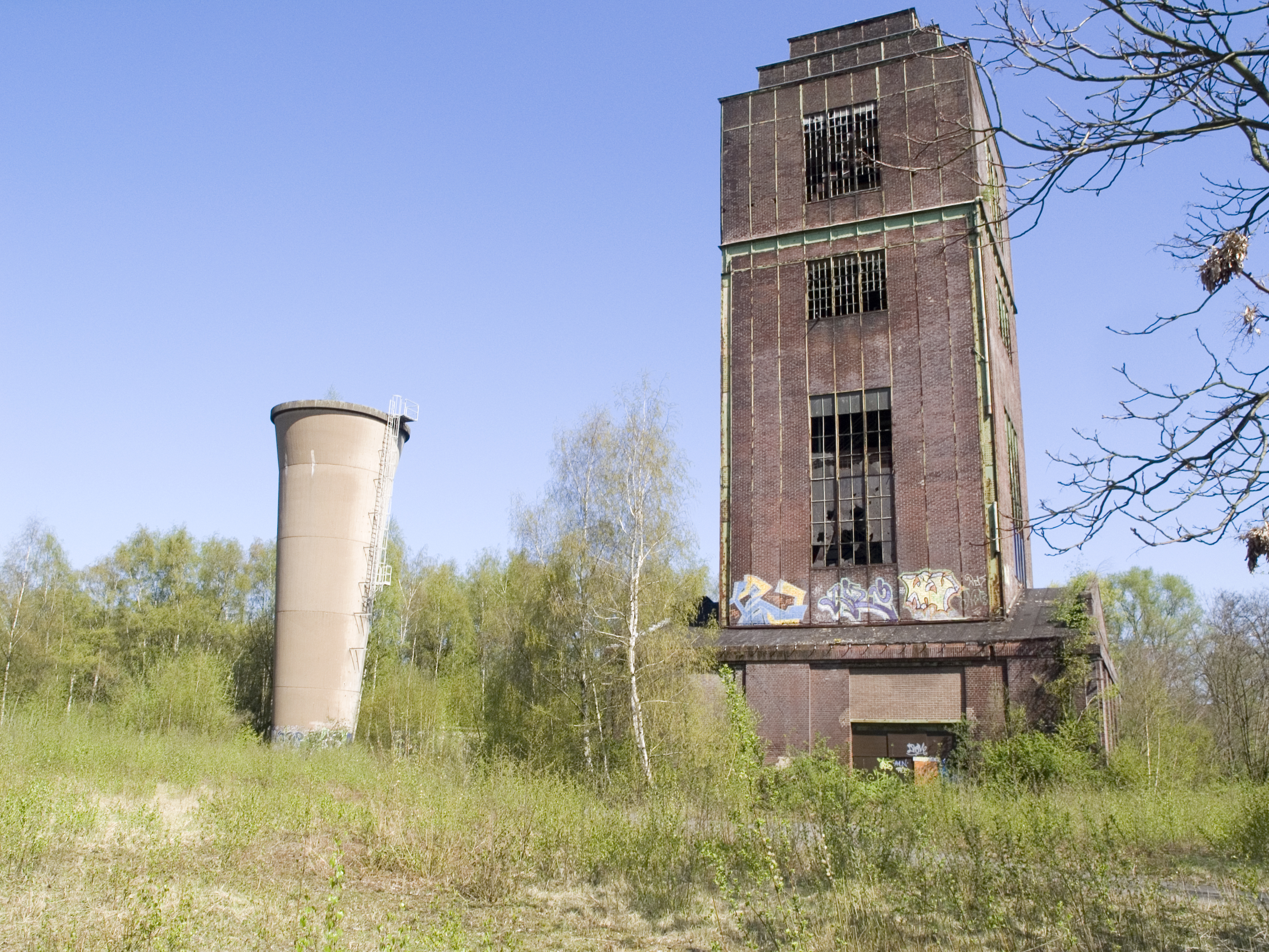 Северный Рейн - Вестфалия, Оберхаузен, Клостерхардт - шахта Остерфельд №4